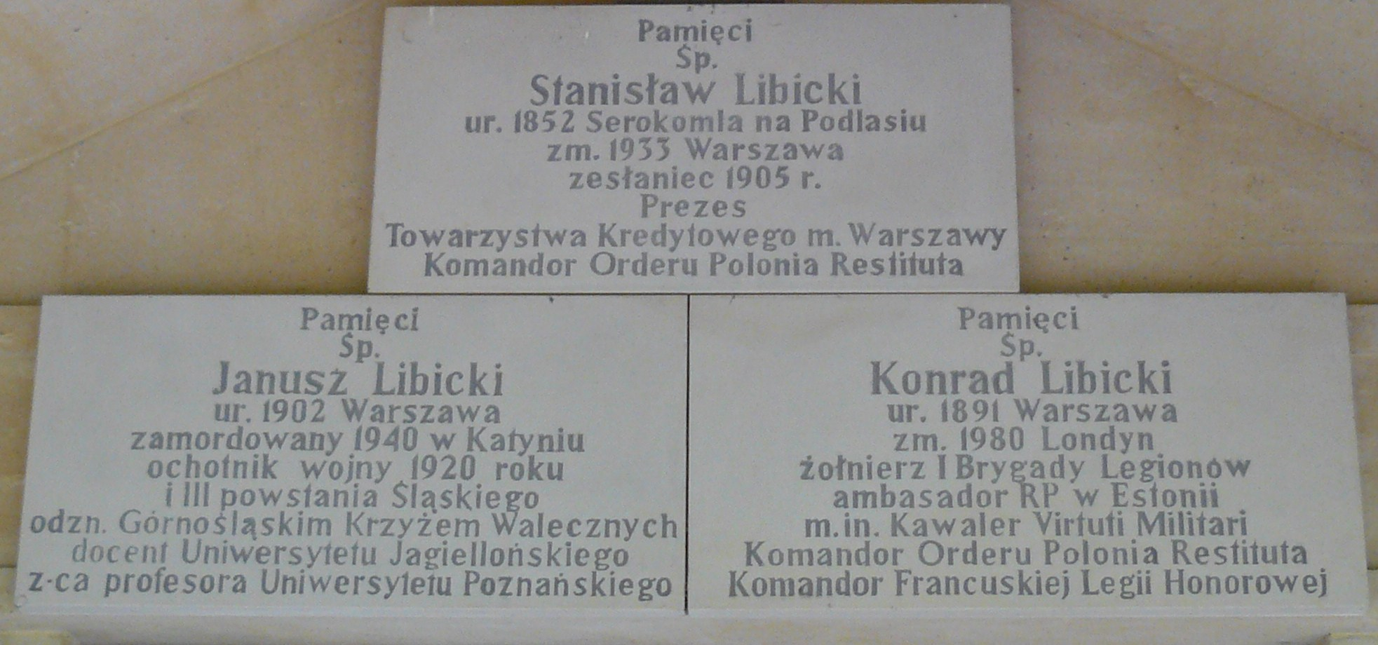 Radzewice, Strzalko-Libicki Mausoleum